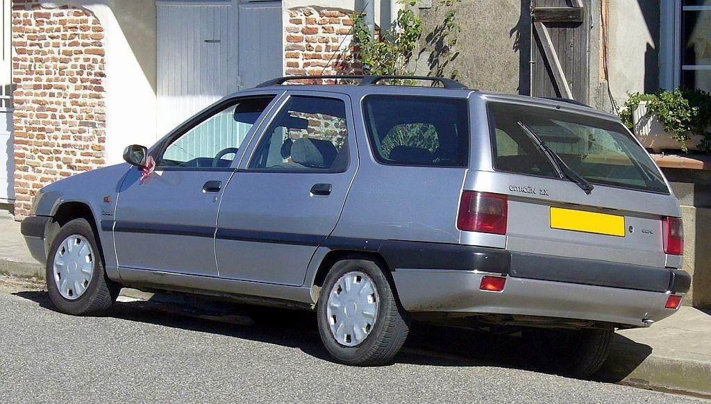 Citroën ZX